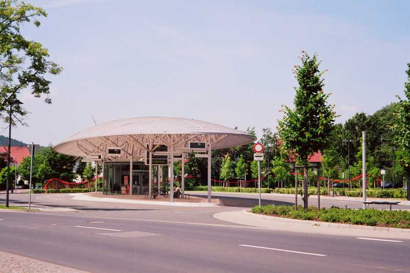 Busbahnhof in Heilbad Heiligenstadt, Thüringen - Central Busstop in Heilbad Heiligenstadt, Thuringia, Germany